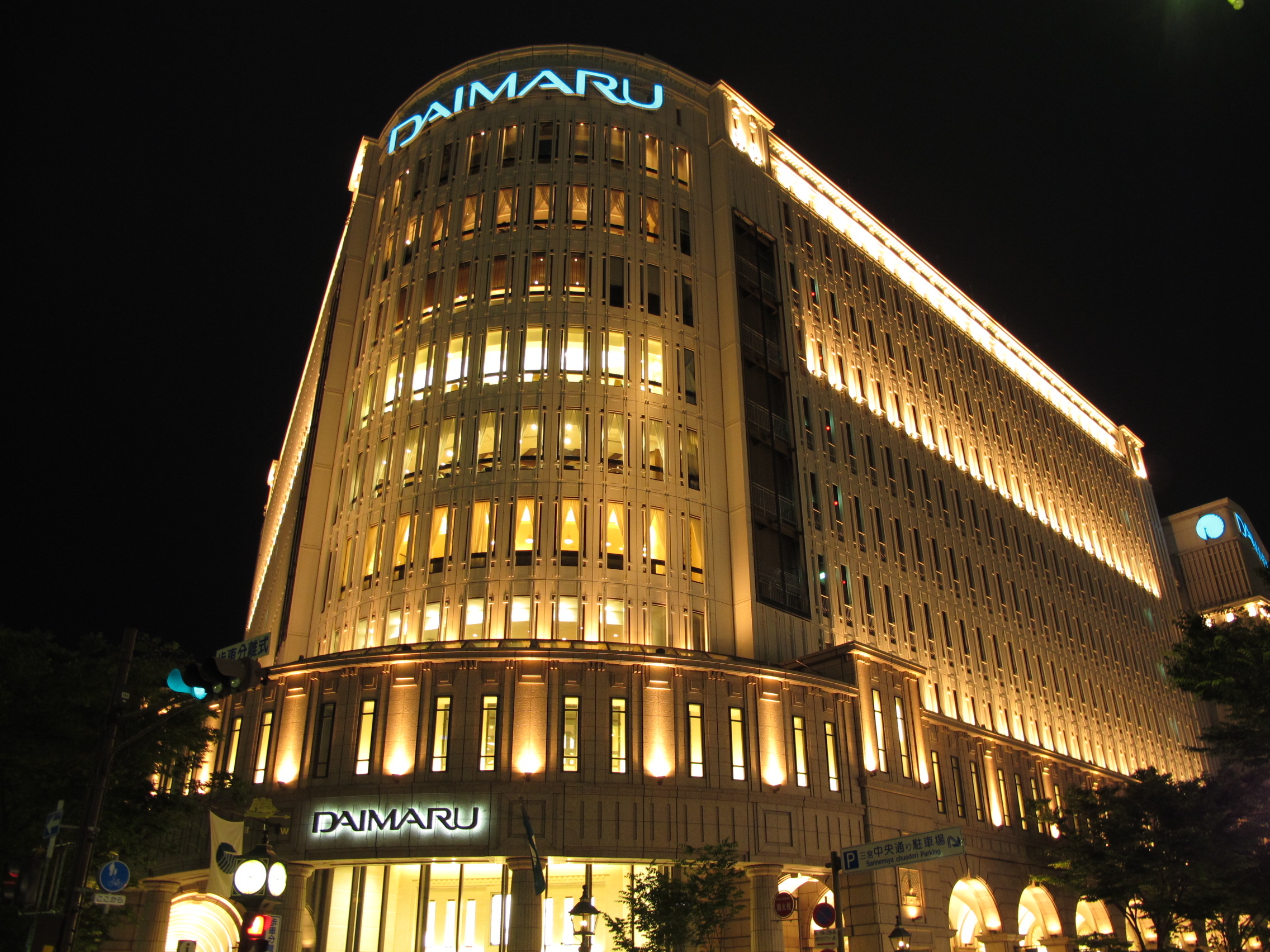 Daimaru Kobe Store